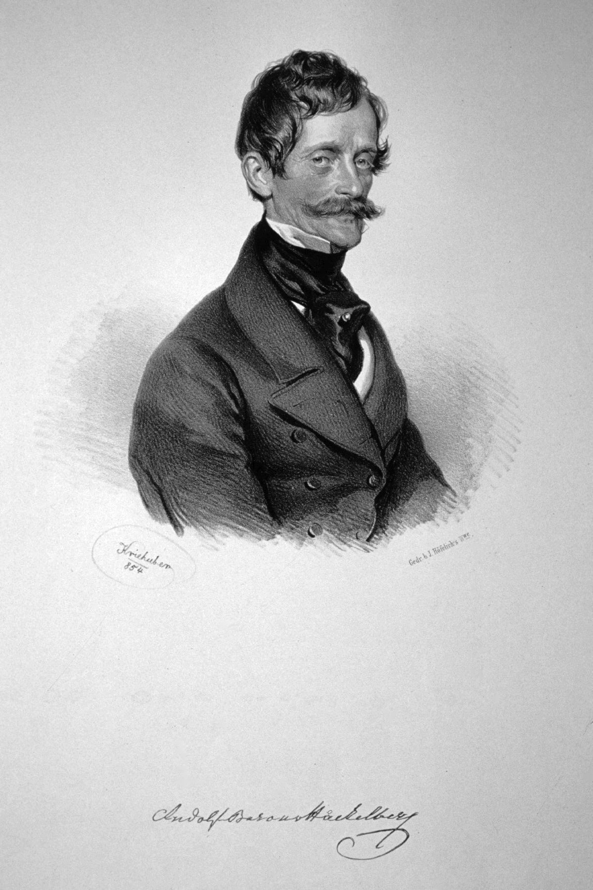 Rudolf Freiherr von Hackelberg-Landau zu Höchenberg (1816-1904), erbliches Mitglied des Herrenhauses Lithographie von Josef Kriehuber, 1854